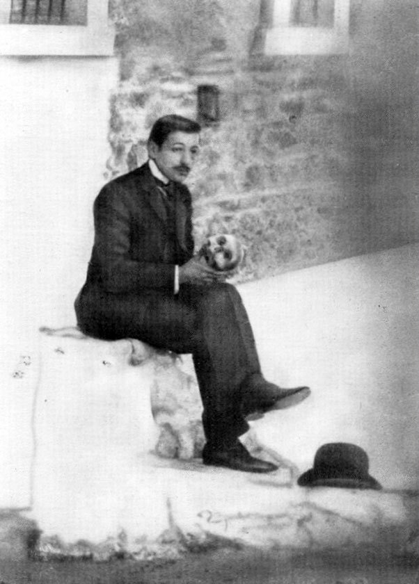 George N. Papanikolaou, anatomy lesson